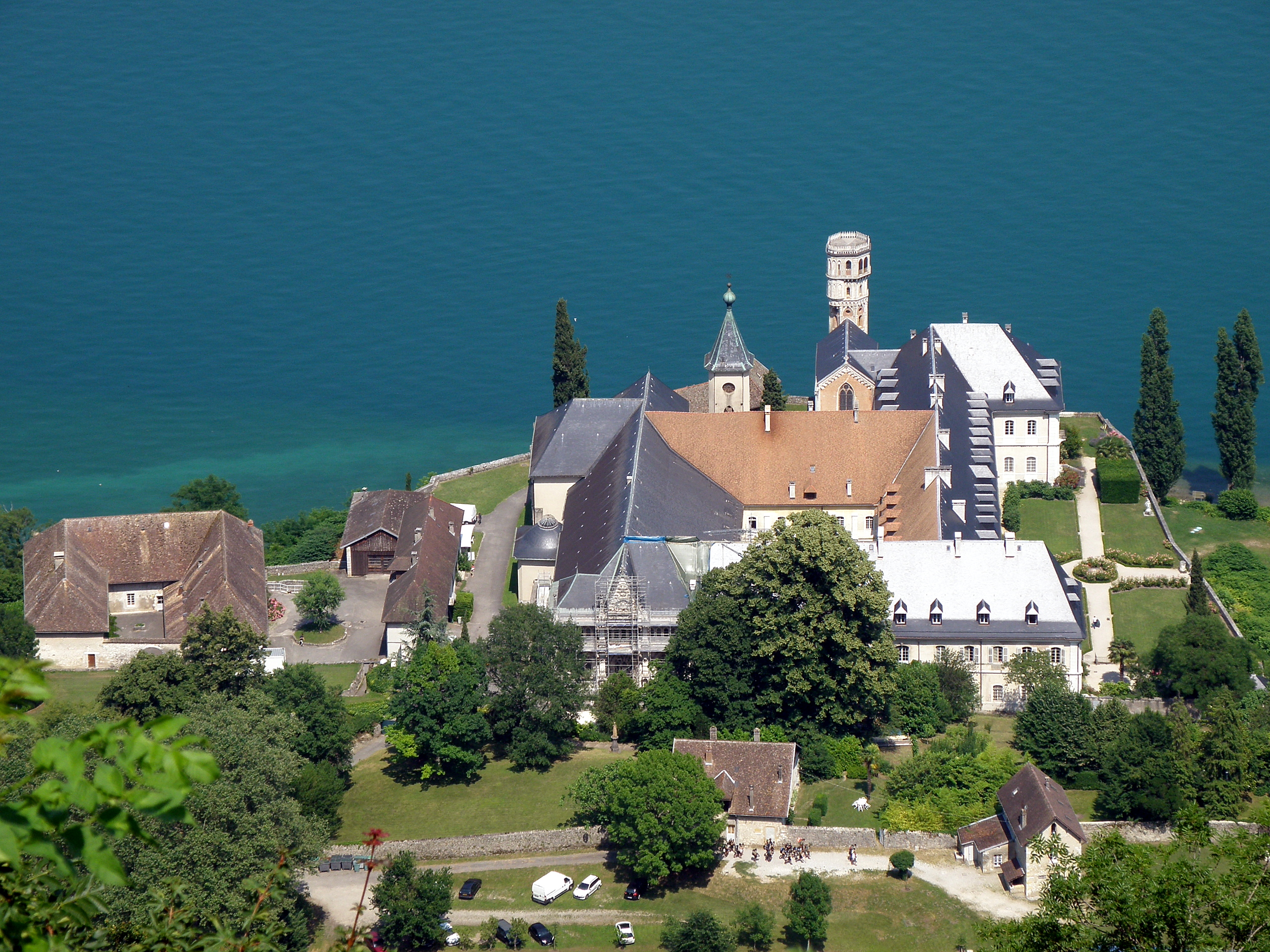 Saint-Pierre-de-Curtille, comm. du département de la Savoie (région Rhône-Alpes, France), sur la rive occidentale du lac du Bourget. Abbaye Notre-Dame-d’Hautecombe, telle qu’on l’aperçoit depuis la départementale 914, laquelle longe le lac sur le flanc de la montagne de la Charvaz, en contre-haut de l'abbaye. Nous regardons vers l’est.